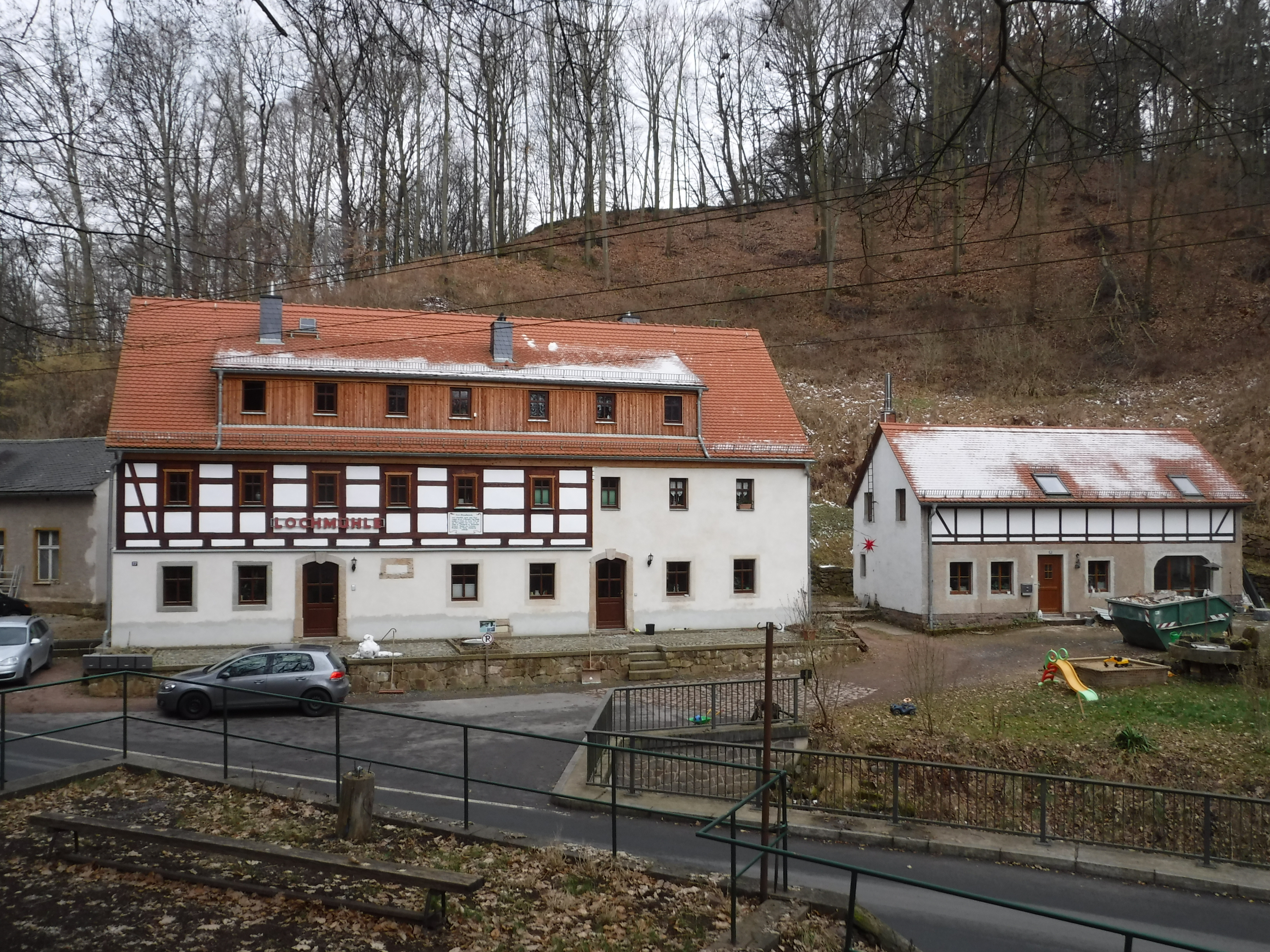 Lochmühle (Oberwartha), Blick von Norden